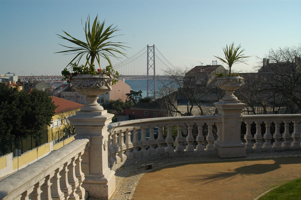 Pestana Palace Hotel-Varanda, Lisboa